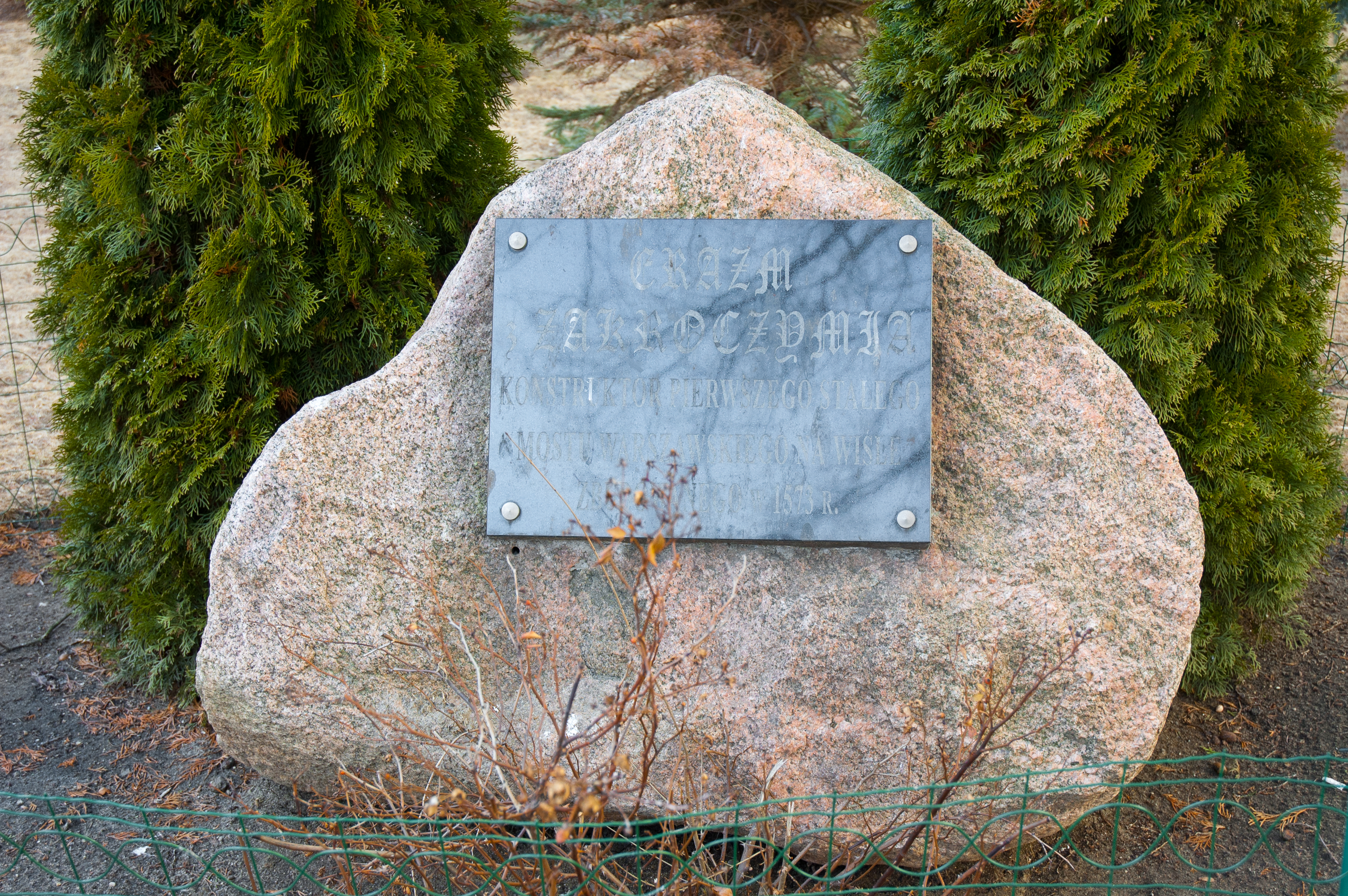 Erazm z Zakroczymia - tablica upamiętniająca - Warszawa Tarchomin